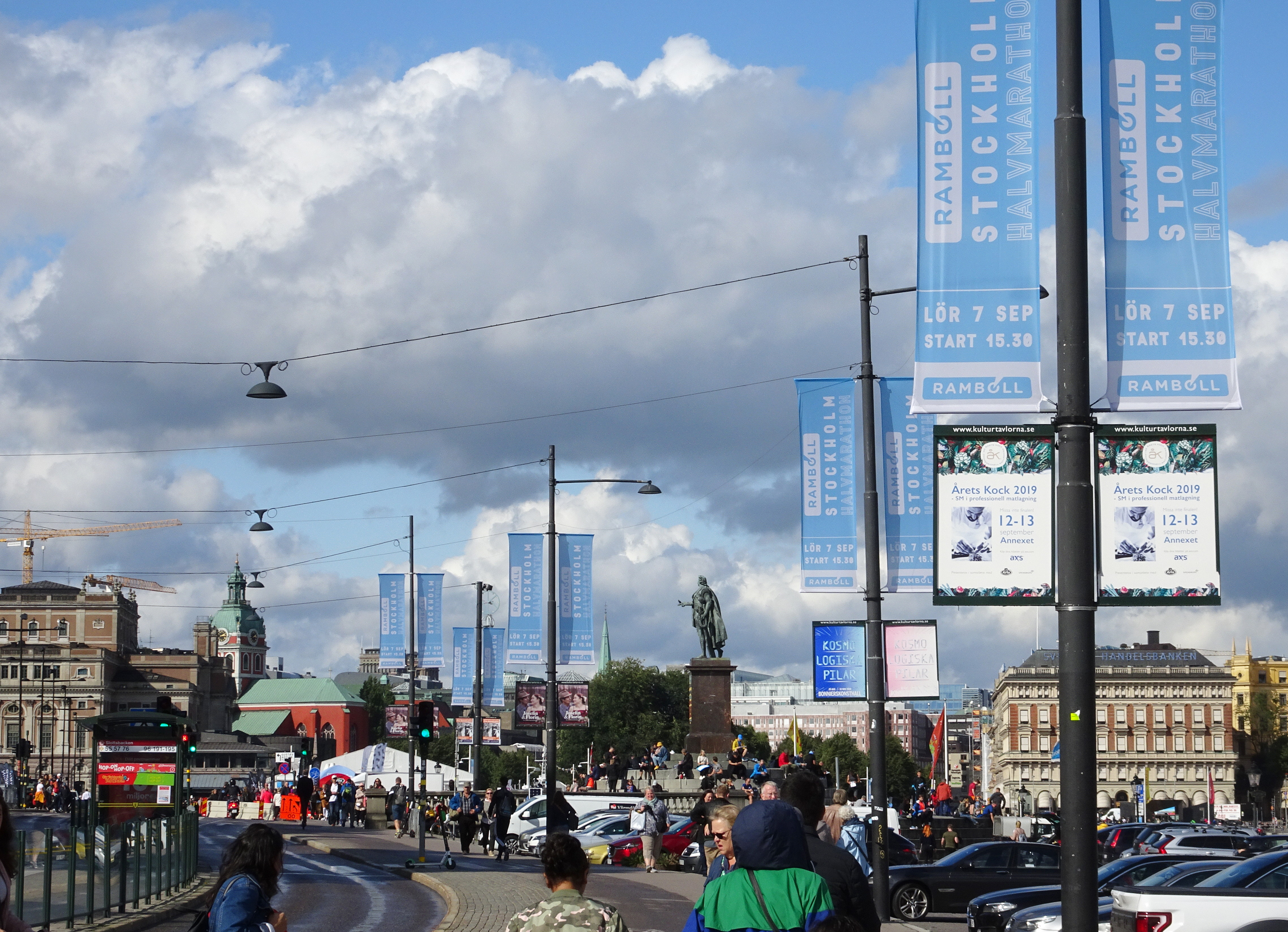 Skeppsbron under Stockholm halvmarathon